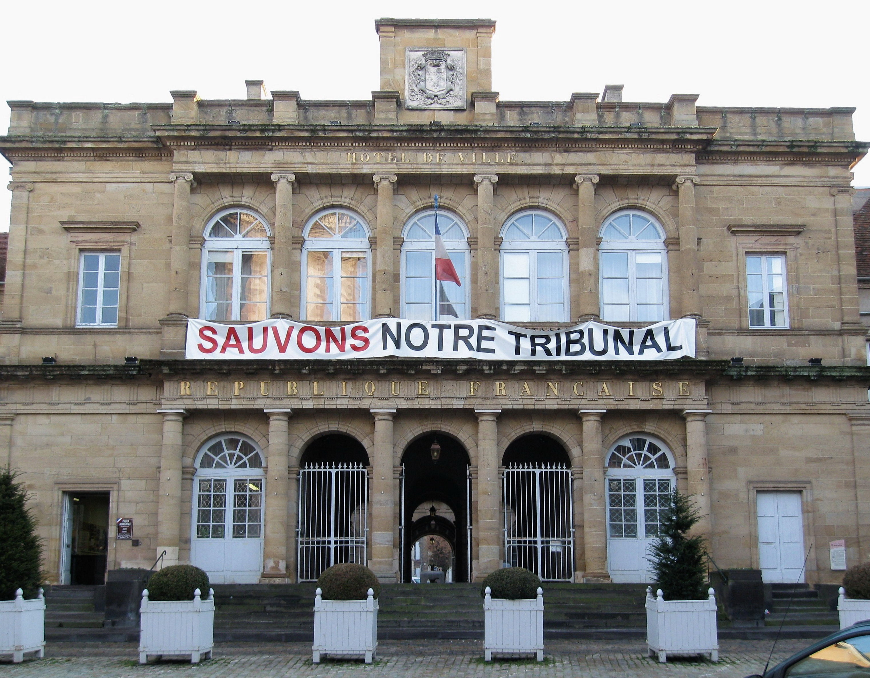 Hôtel de Ville, Moulins, Allier, France